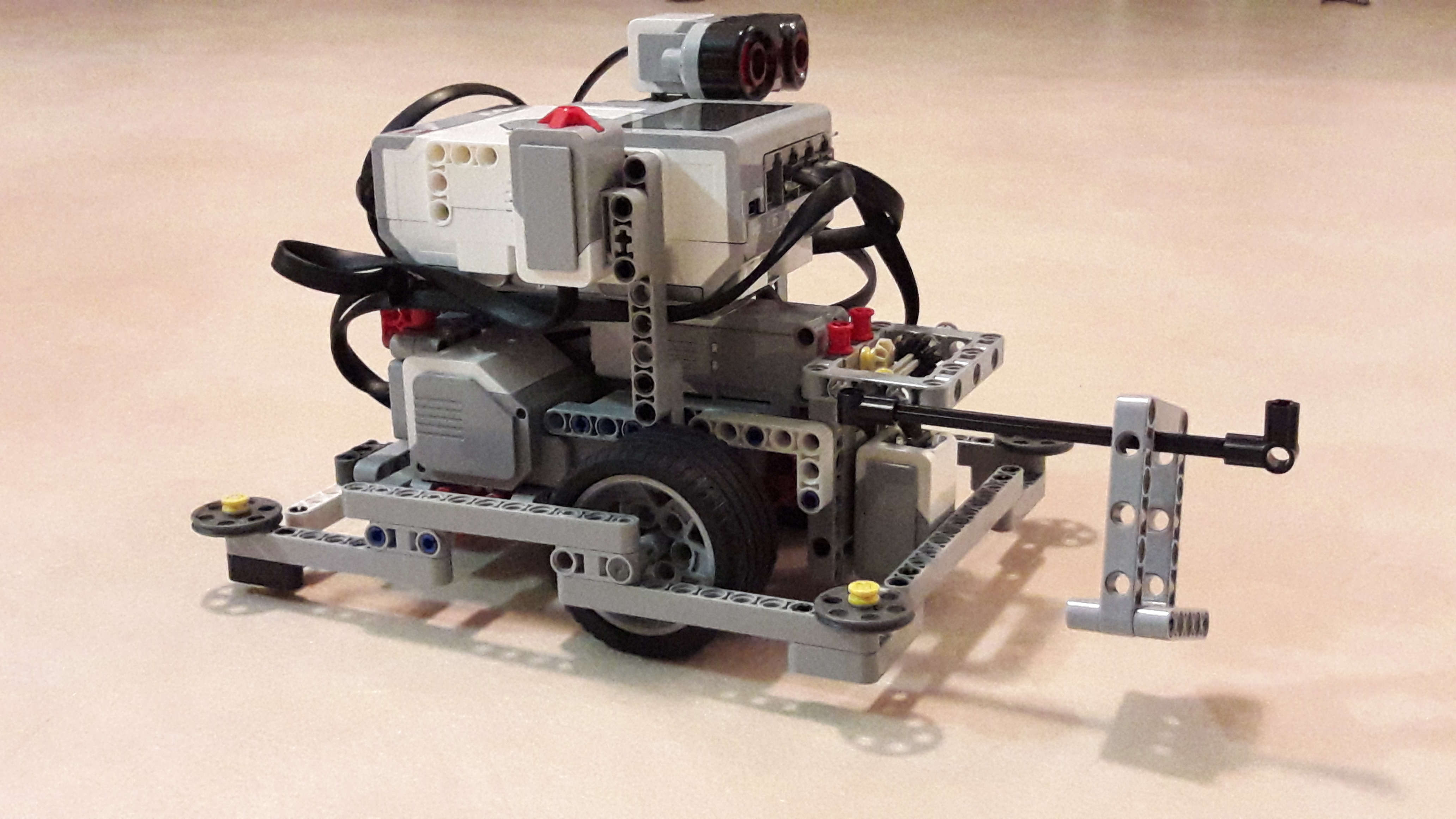 Een robot bgebouwd met de EV3